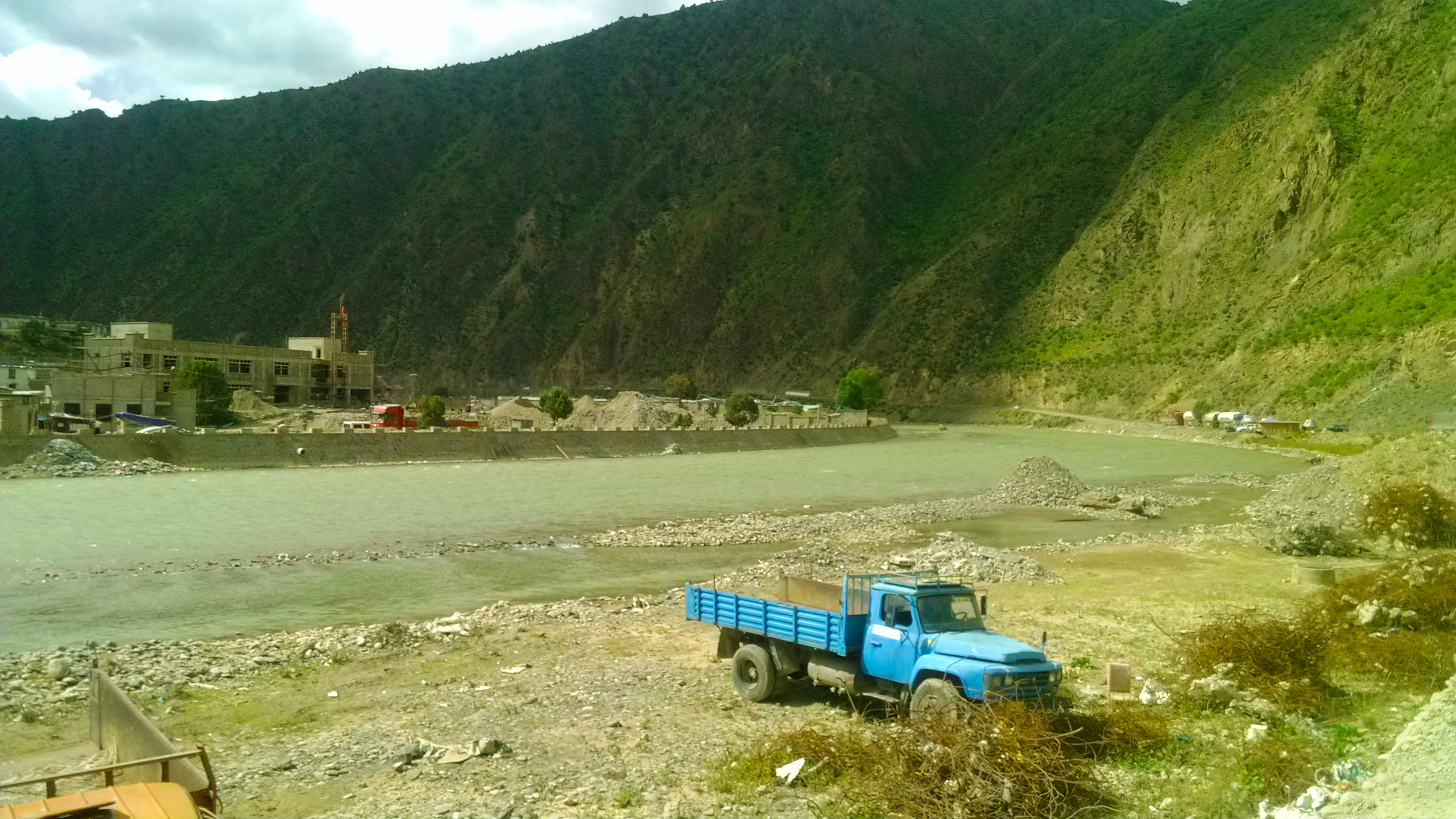 中国西藏左贡县的玉曲，拍摄于县城西北郊。